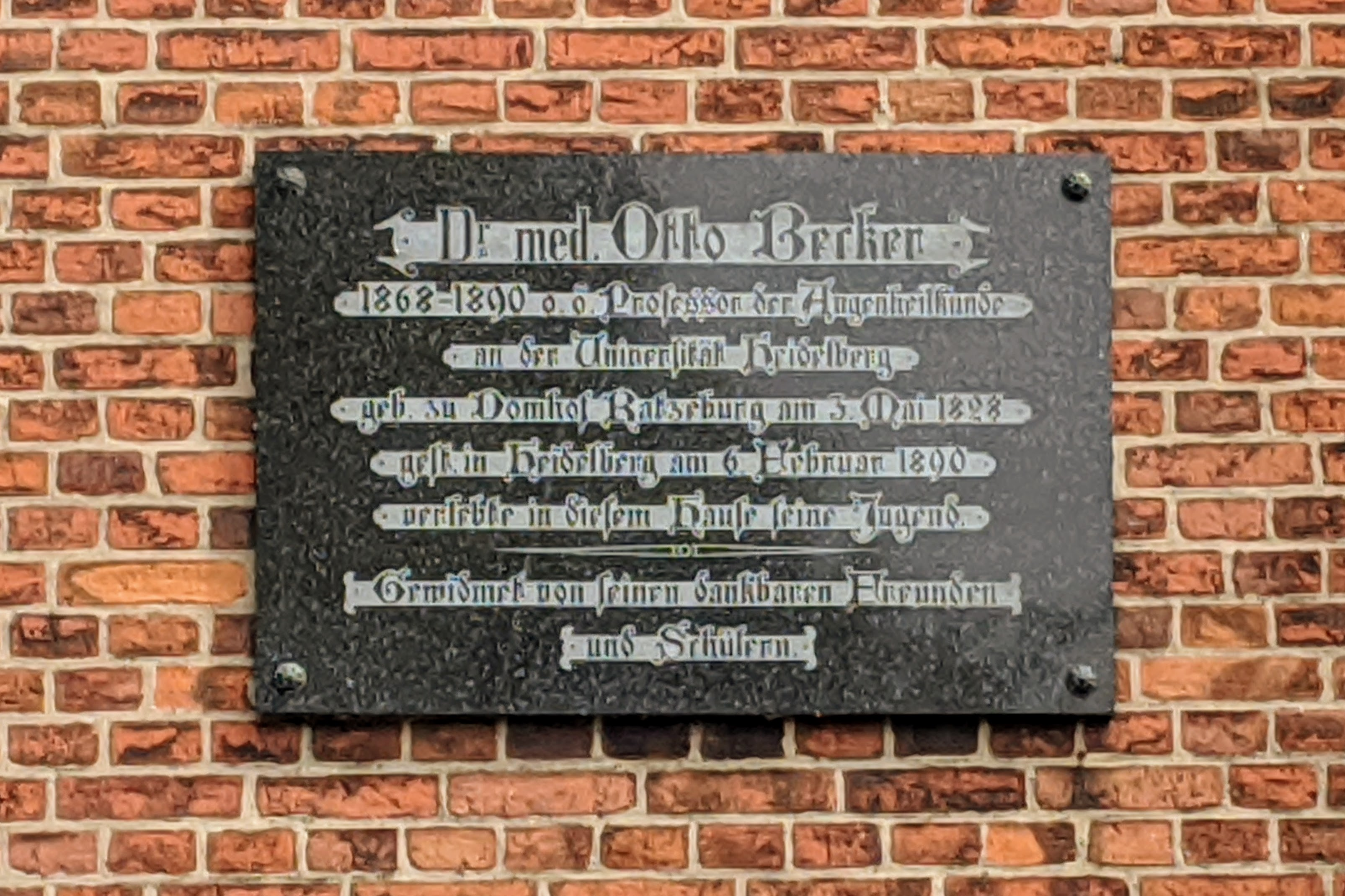 Tafel am Baudenkmal Domhof 40 (ehem. Direktorenhaus/Domschule) in Ratzeburg